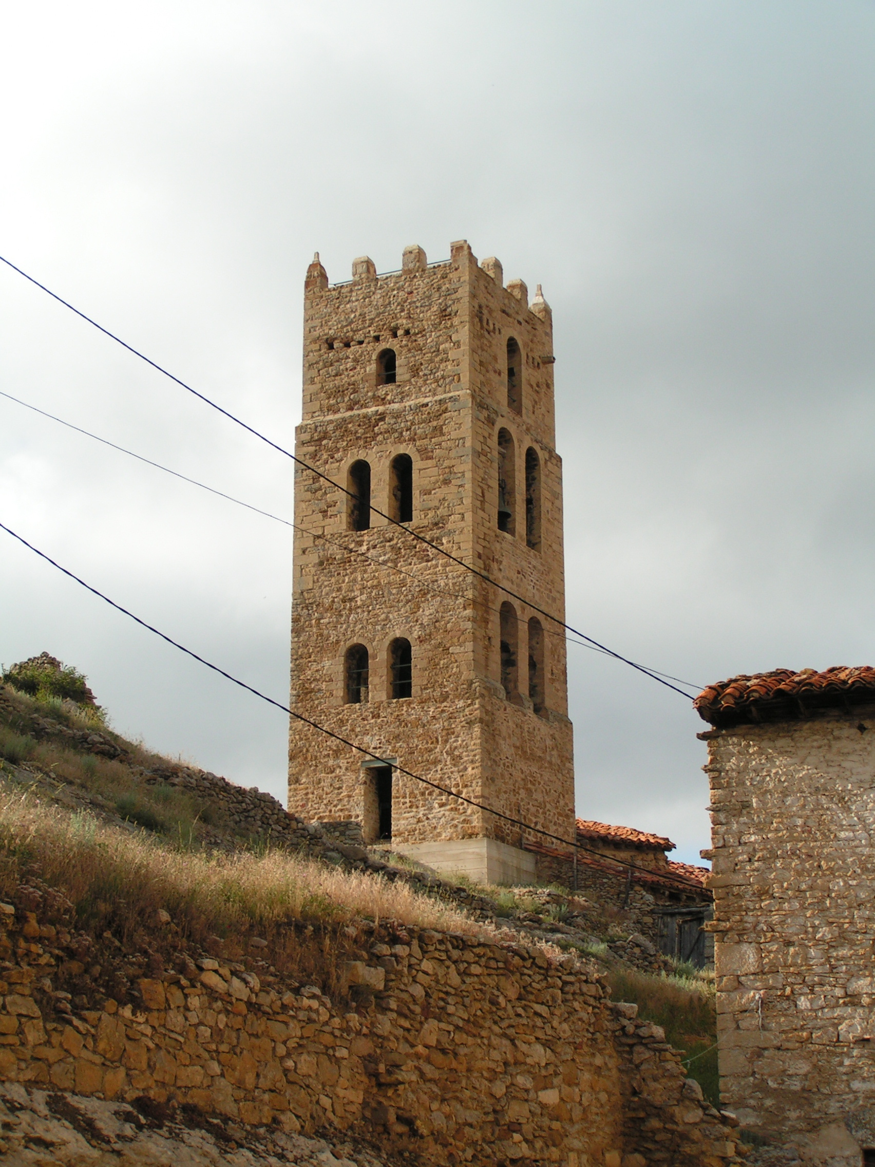 Campanar de l'església de Villarroya de los Pinares, que està separat d'aquesta, en una elevació propera.